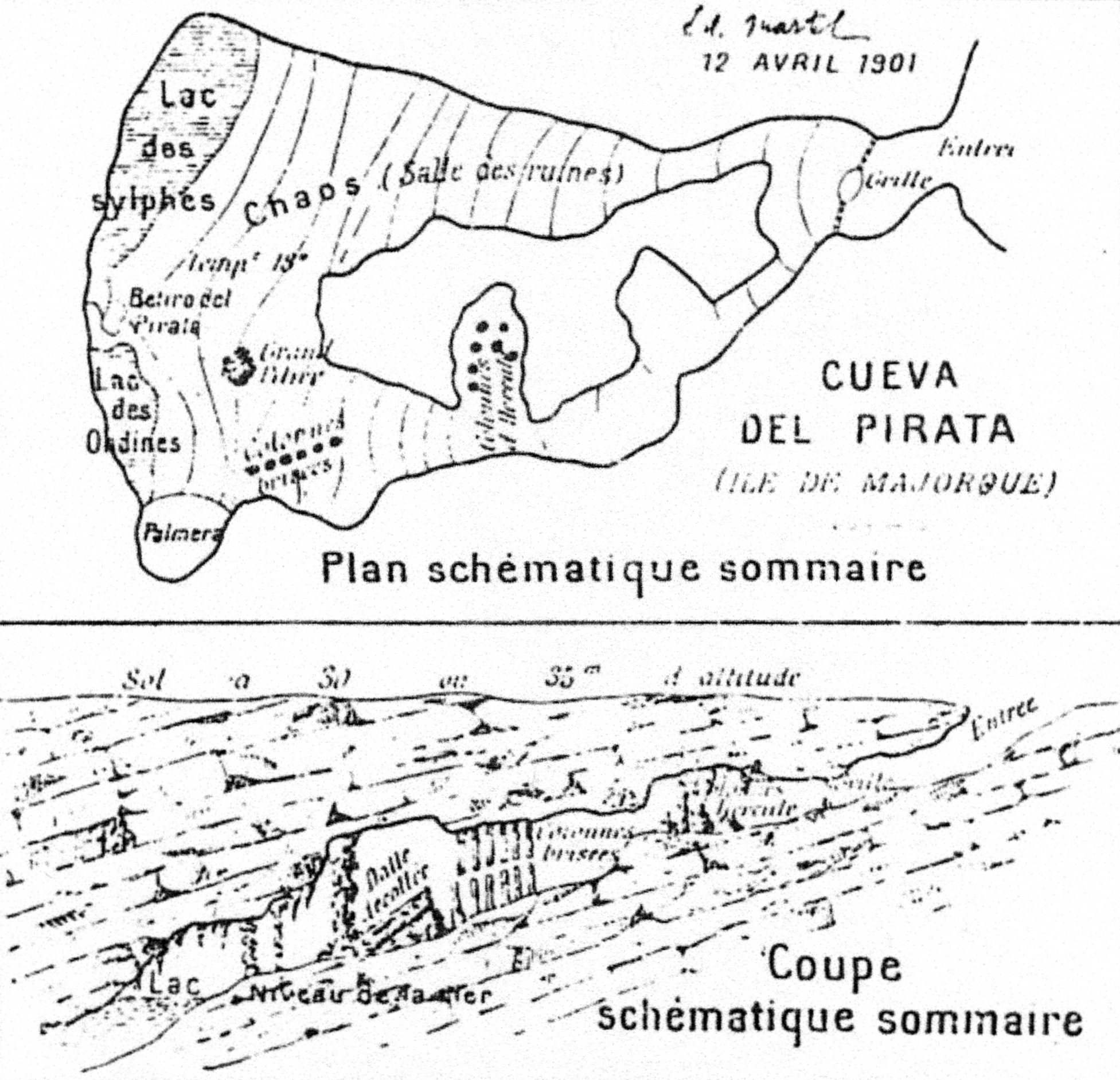 Schematische Skizze der Cova des Pirata an der Ostküste von Mallorca, Spanien